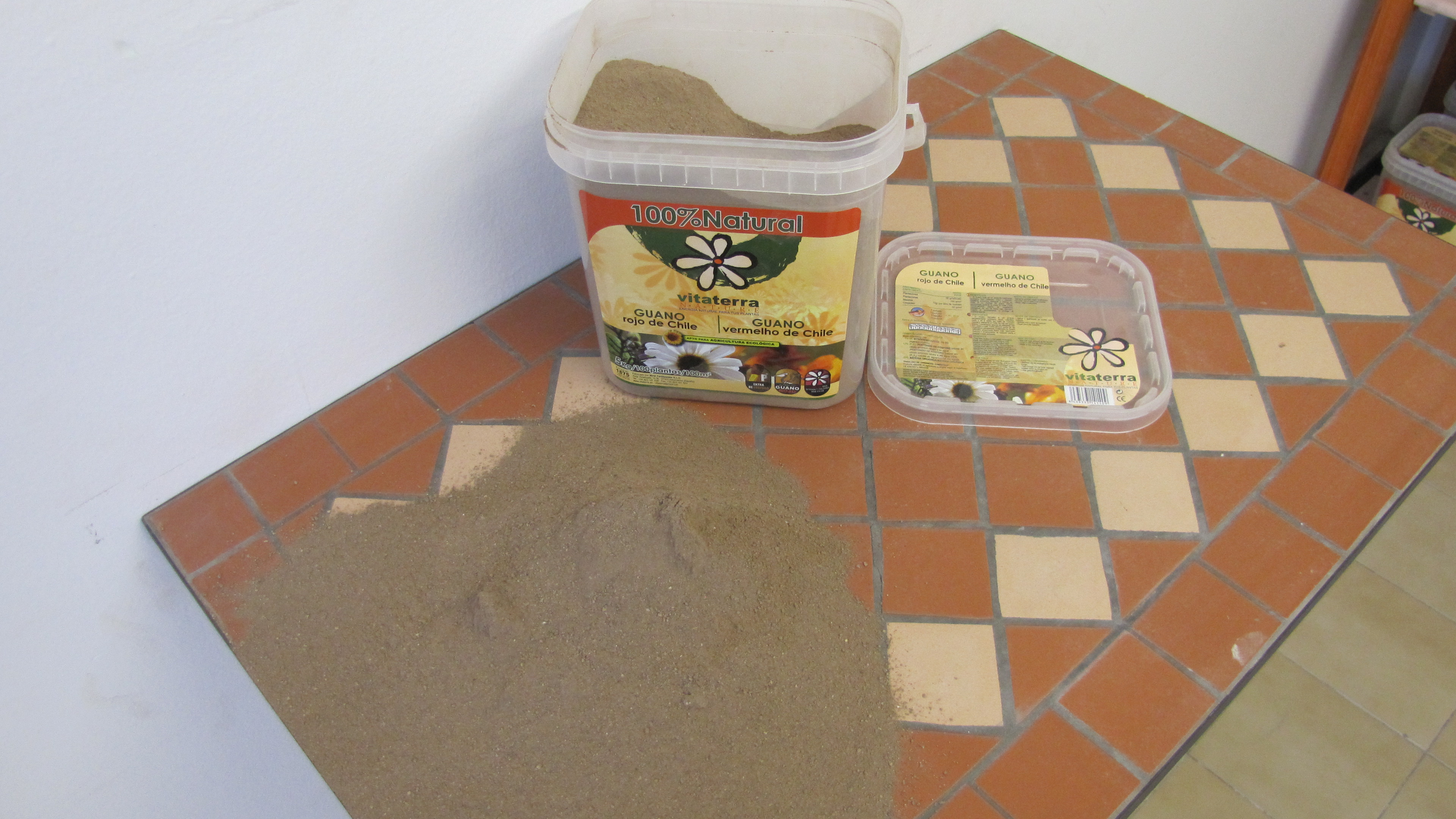 Guano Rojo de Chile, perteneciente a Vitaterra. El Guano es un abono ecológico y fósil procedente de una mina chilena, formado por excrementos de aves marinas fosilizados, hoy en día es un abono considerado rico en Fósforo.